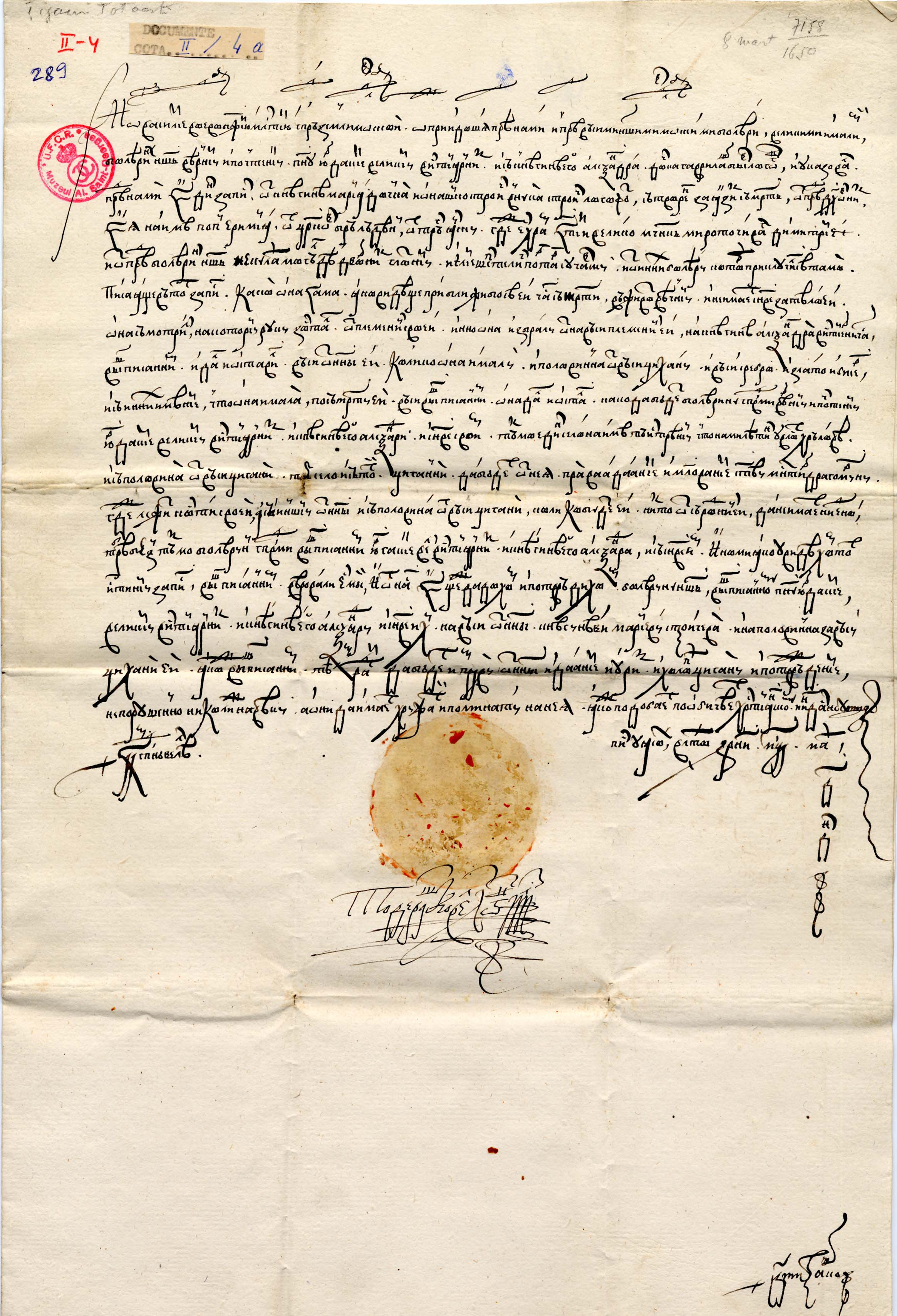 Iaşi. Vasile (Lupu) Vv. întăreşte lui Iordache mare vistier şi soţiei lui Alexandru jumătate din ţigani şi ocinile ce le-au lăsat Maria fiica lui Ionaşco Stroici. Orig. slav.